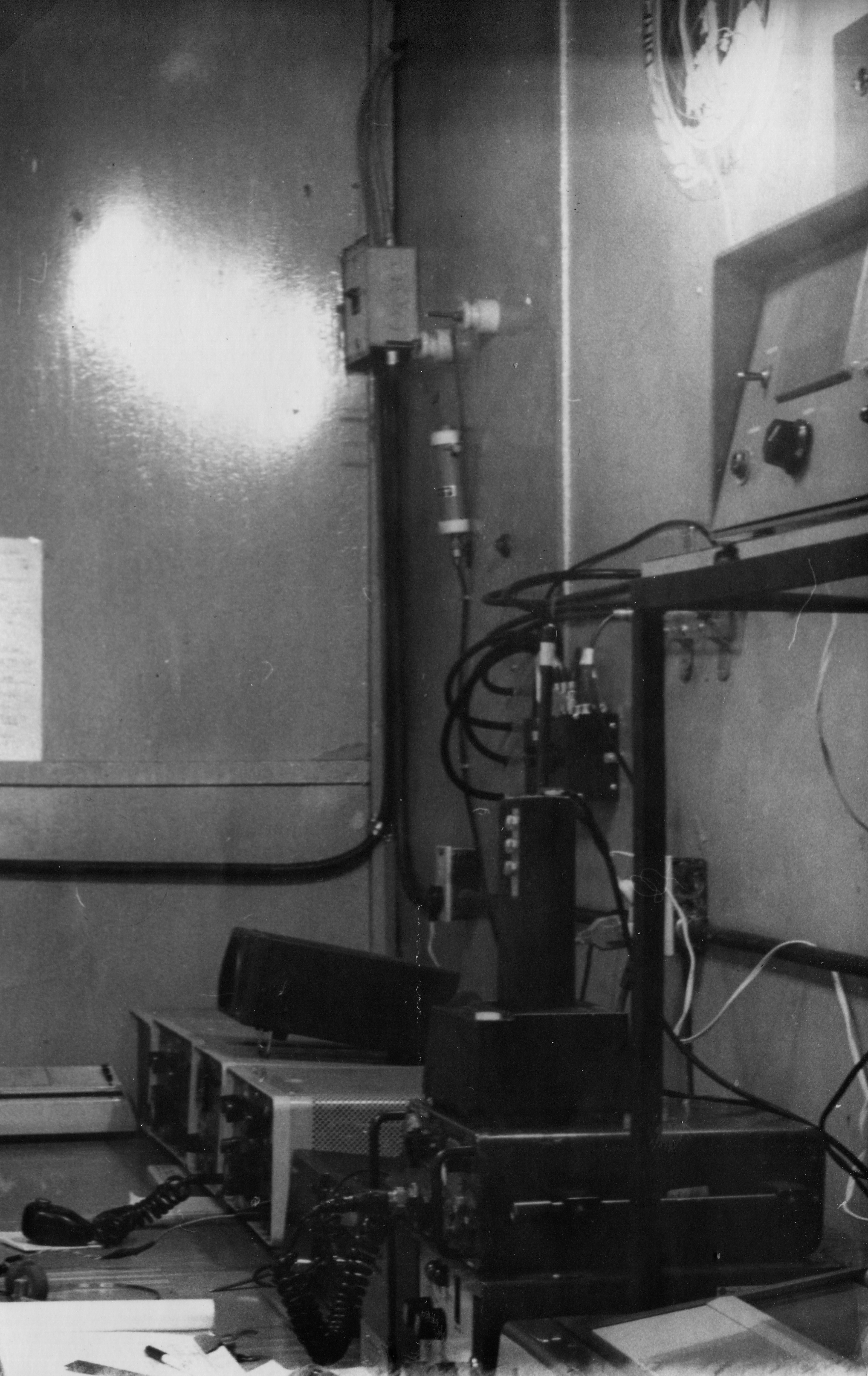 Radio de la Base Carlini, en ese momento Jubany, en 1985.